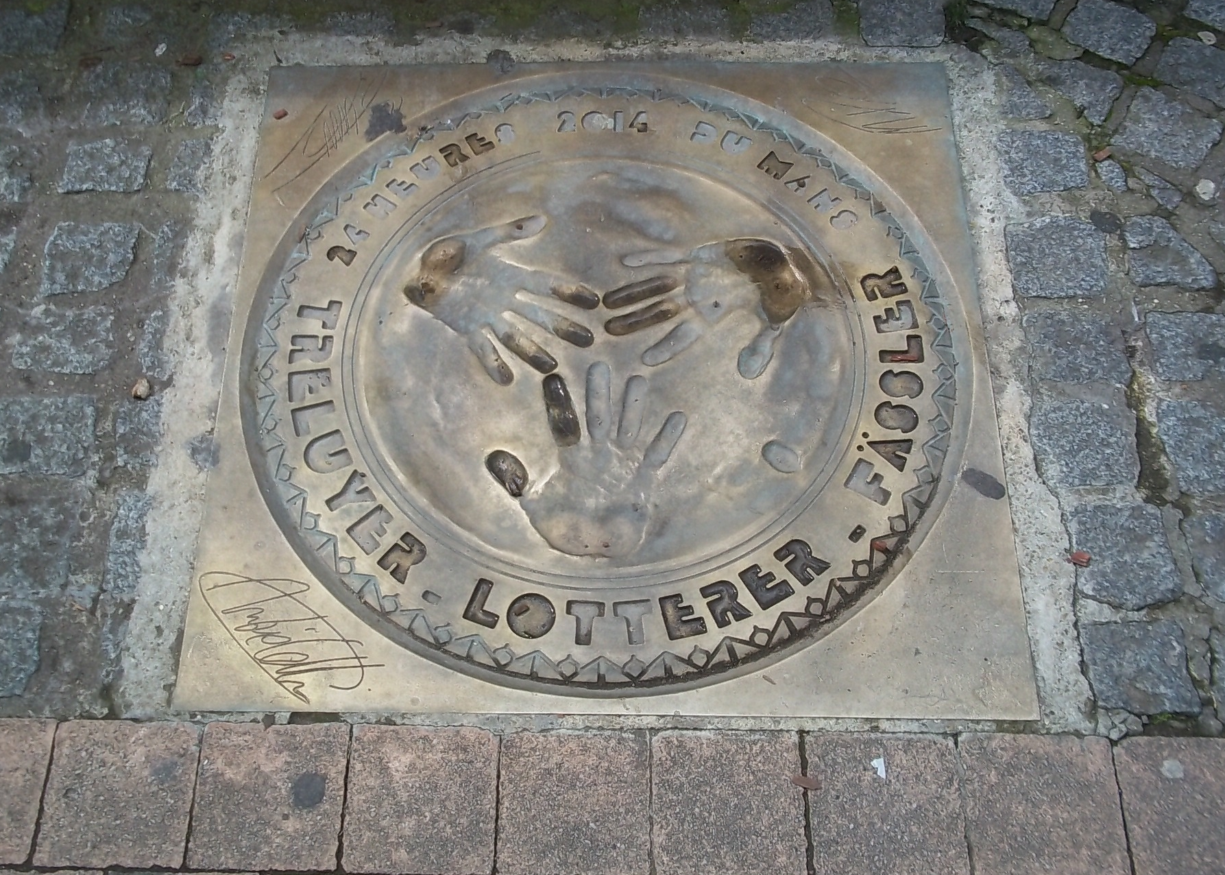 Plaque de bronze des empreintes des vainqueurs des 24 heures 2014